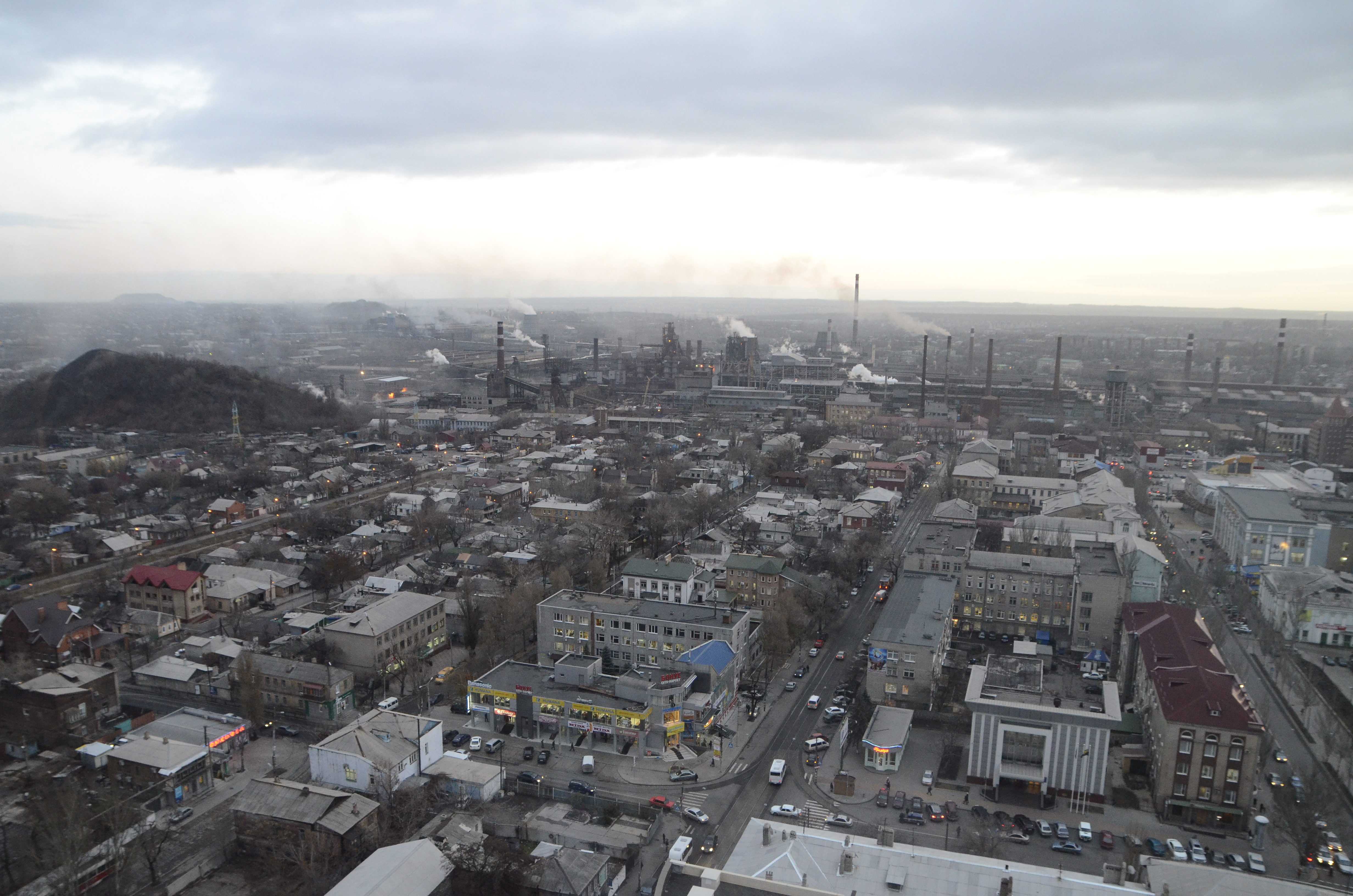 Вид Донецка с 20 этажа торгово-развлекательного комплекса Green Plaza